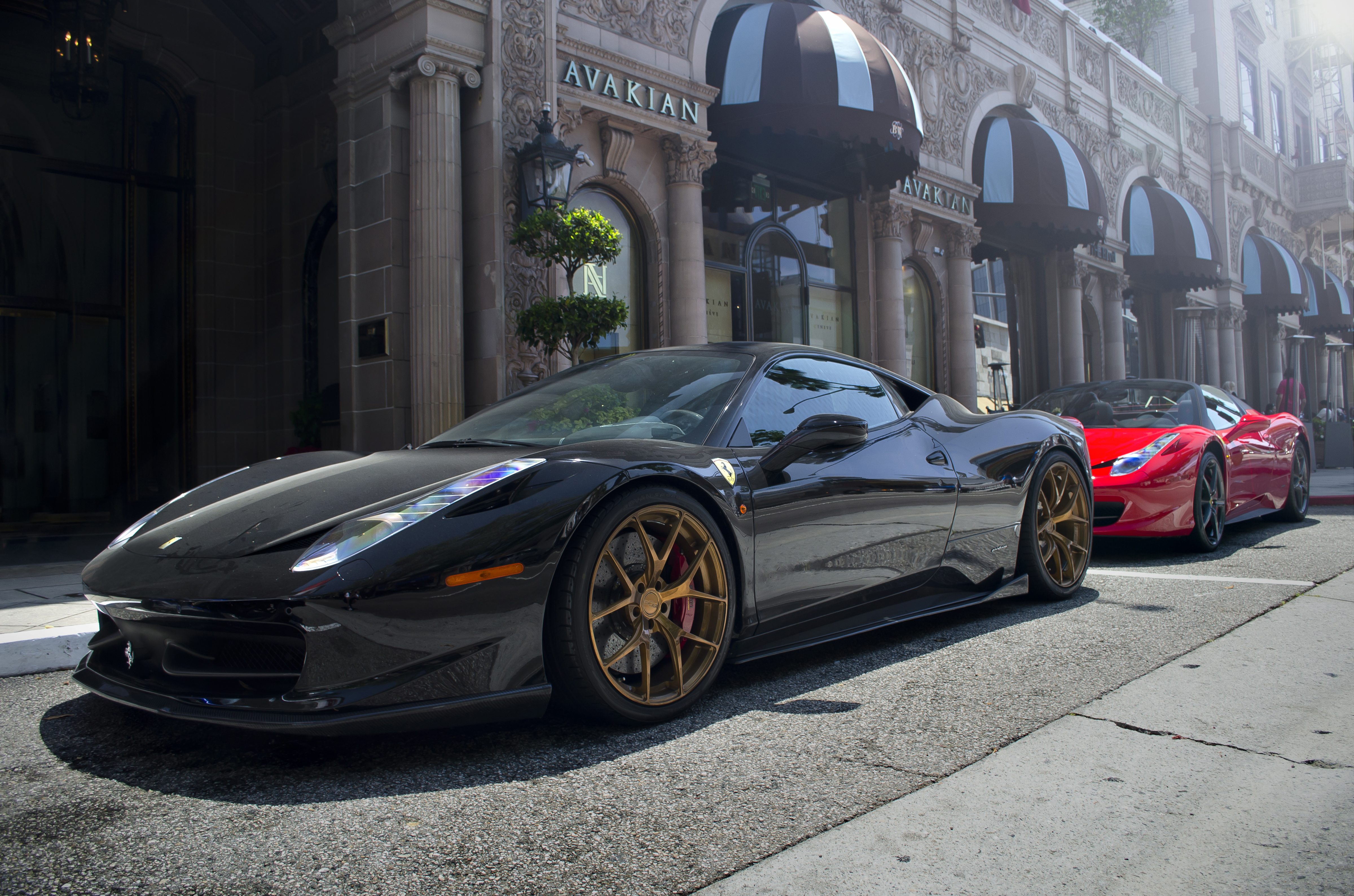 Custom Ferrari 458 Italia x 2.